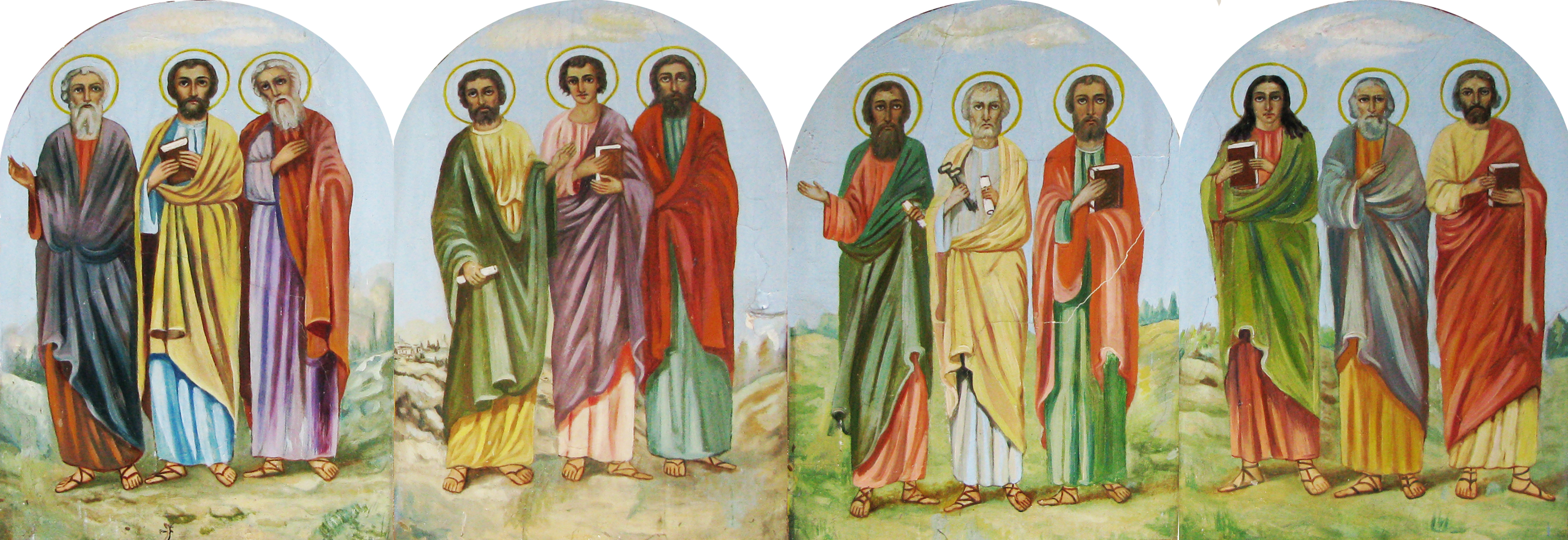 12 апостолів